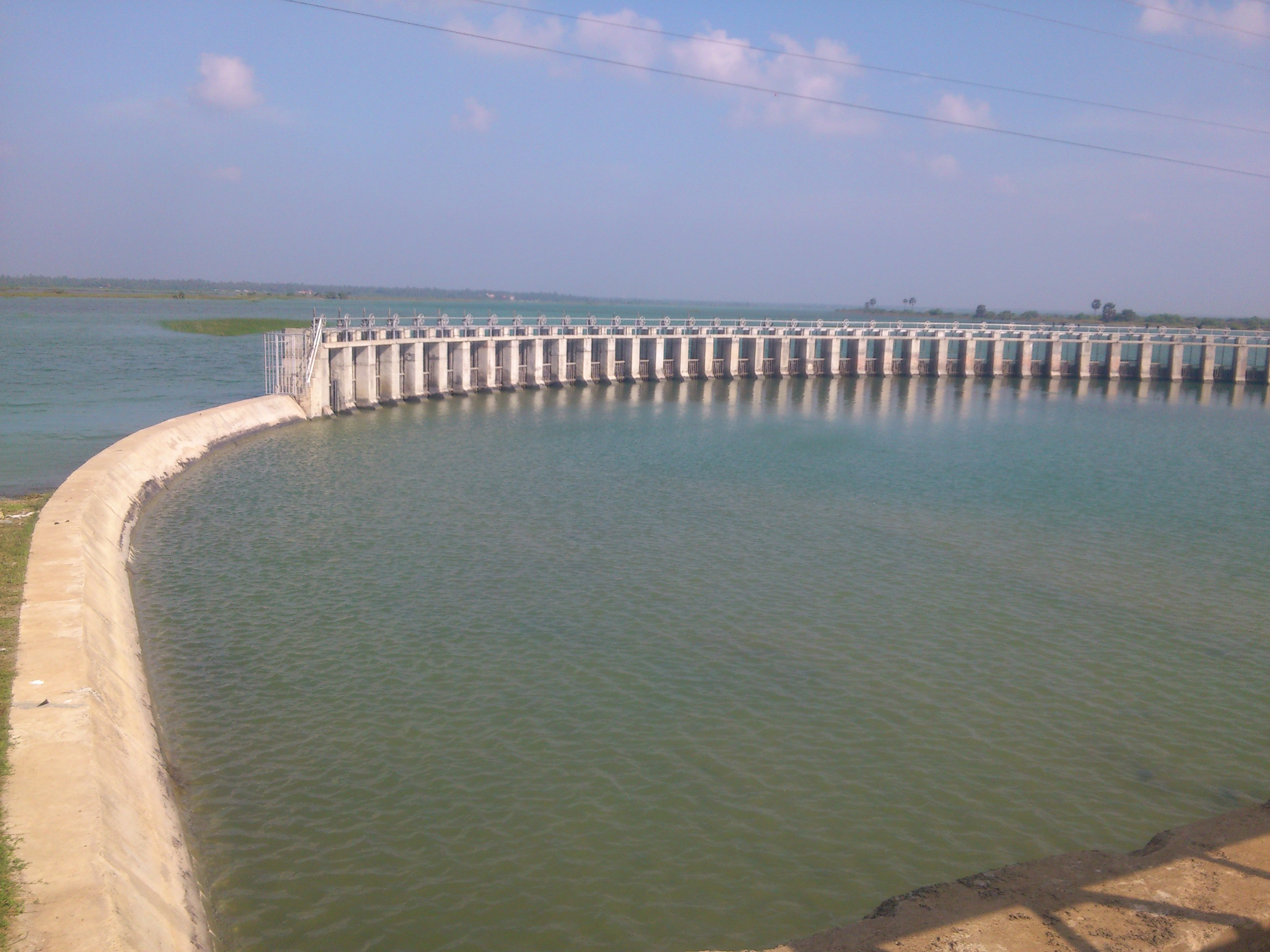 பாலம்